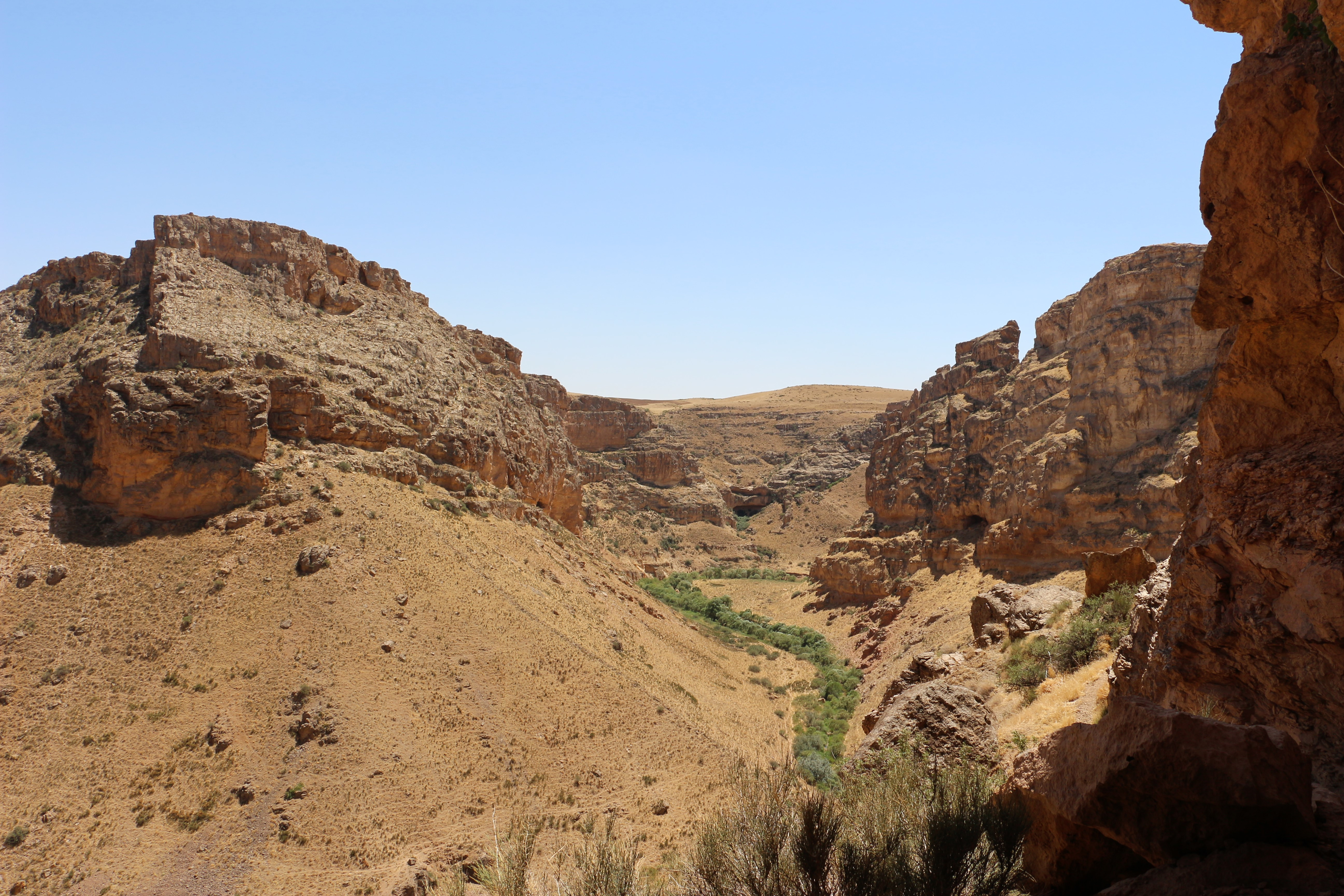 دژ و قلعه قمچقا/ دره شاهان